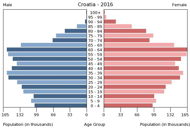 A population pyramid illustrates the age and sex structure of a country's population and may provide insights about political and social stability, as well as economic development. The population is distributed along the horizontal axis, with males shown on the left and females on the right. The male and female populations are broken down into 5-year age groups represented as horizontal bars along the vertical axis, with the youngest age groups at the bottom and the oldest at the top. The shape of the population pyramid gradually evolves over time based on fertility, mortality, and international migration trends.